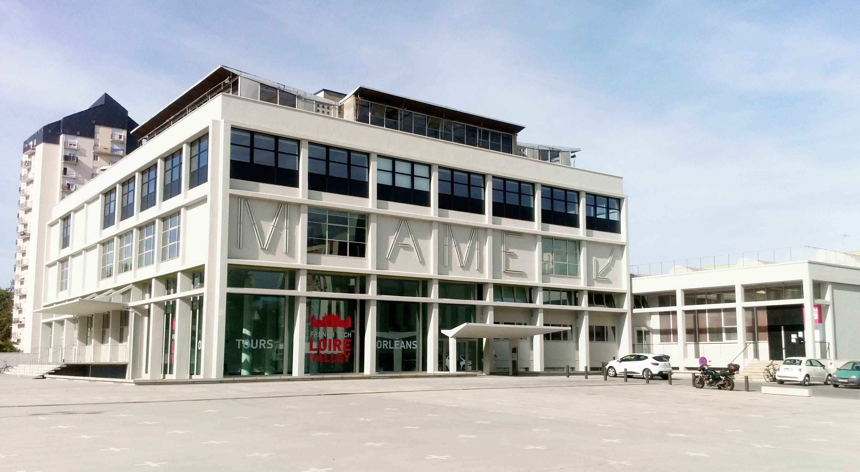 Façade de MAME - Cité de la création numérique.